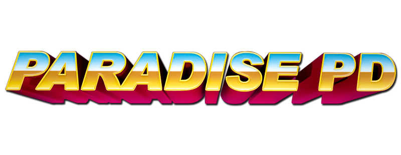 Logotipo de Paradise PD